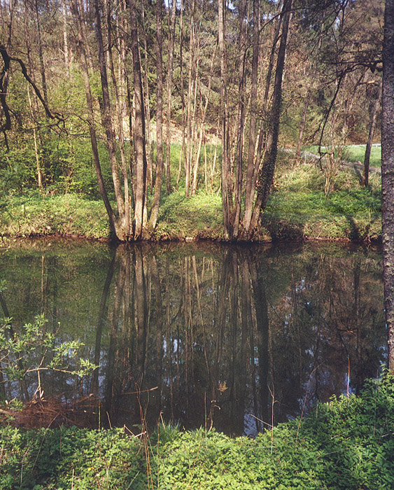 Oberlauf der Nagold zwischen Nagold (Stadt) und Calw